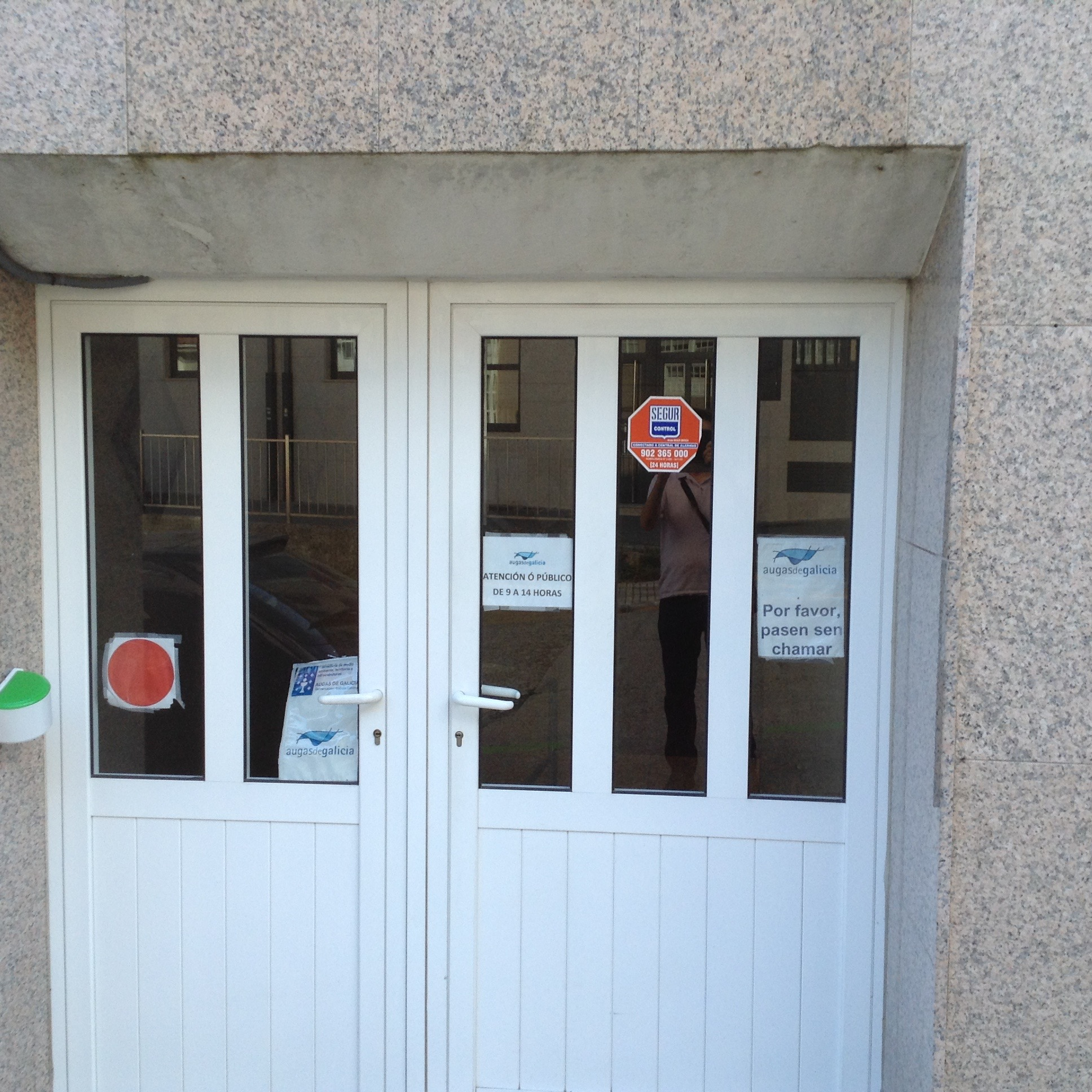 Oficina de atención ao público de Augas de Galicia en Santiago de Compostela